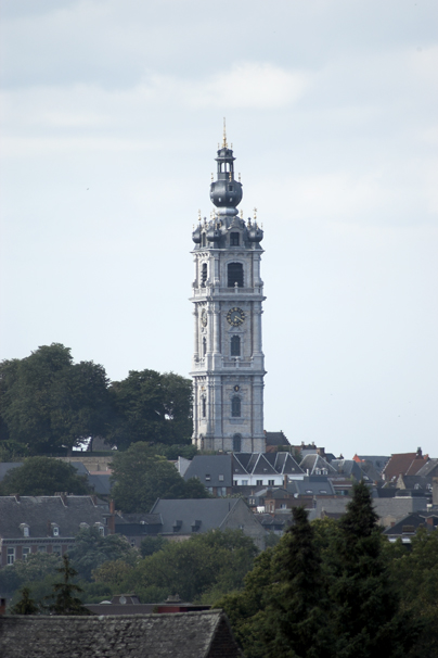 Beffroi de Mons. 10 juillet 2006. Photo Lefrancq. Mons